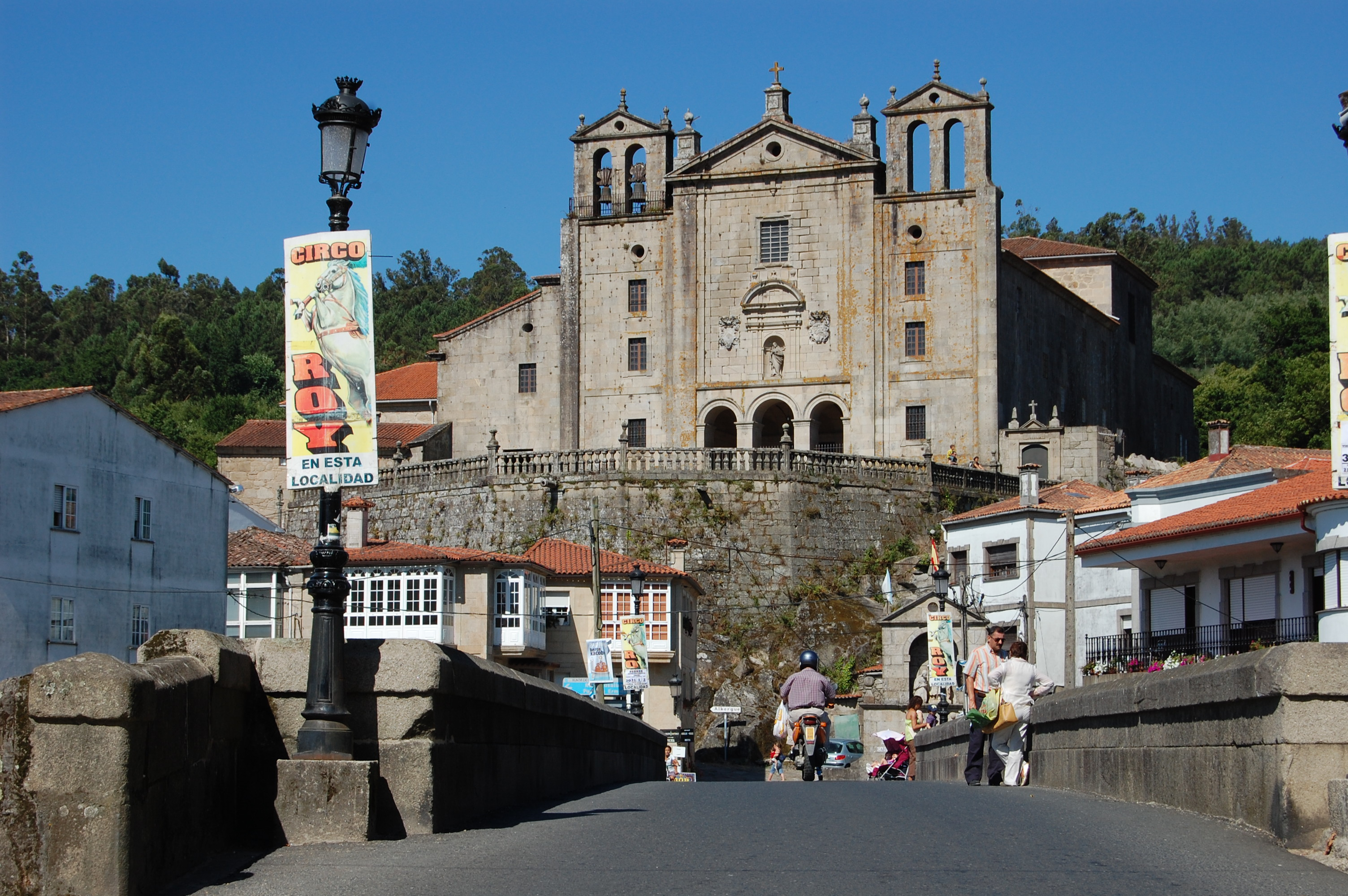 IGLESIA EN PADRON